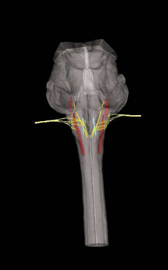 Nerbio bagoaren zuntzak nukleo desberdinetatik ateratzen